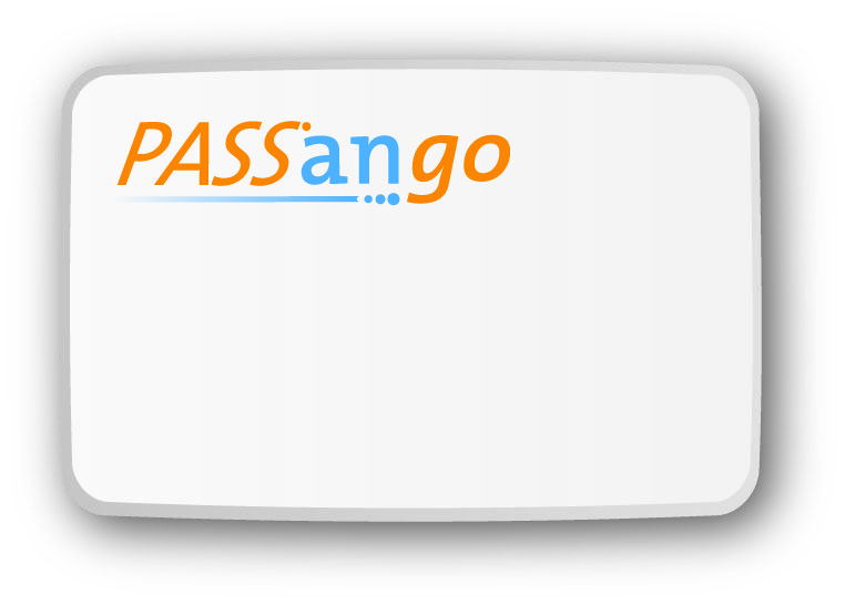 Il s'agit du nouveau boitier de télépéage que l'entreprise AS 24 met à disposition de ses clients.